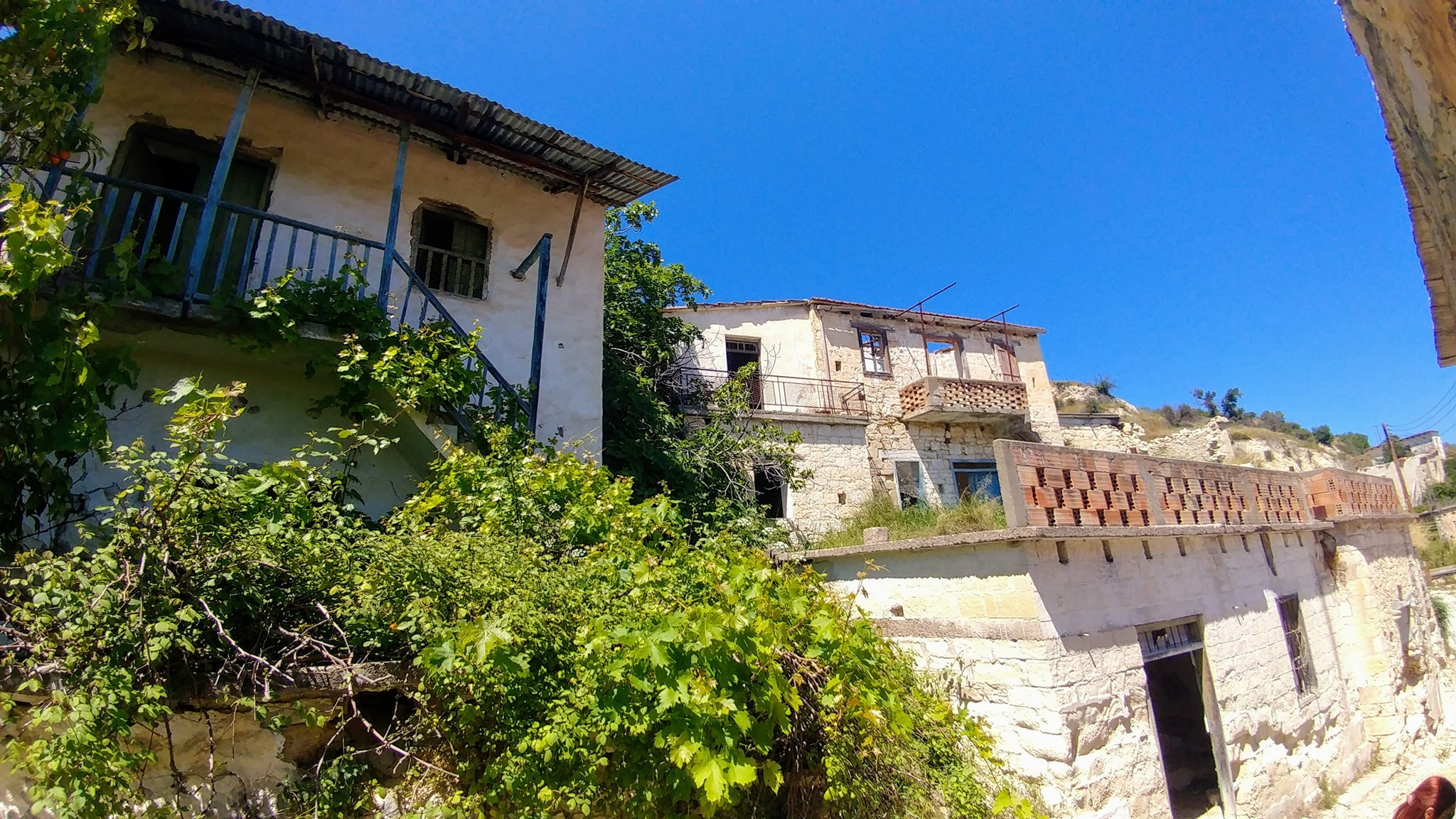 Παλιά Θελέτρα 2020